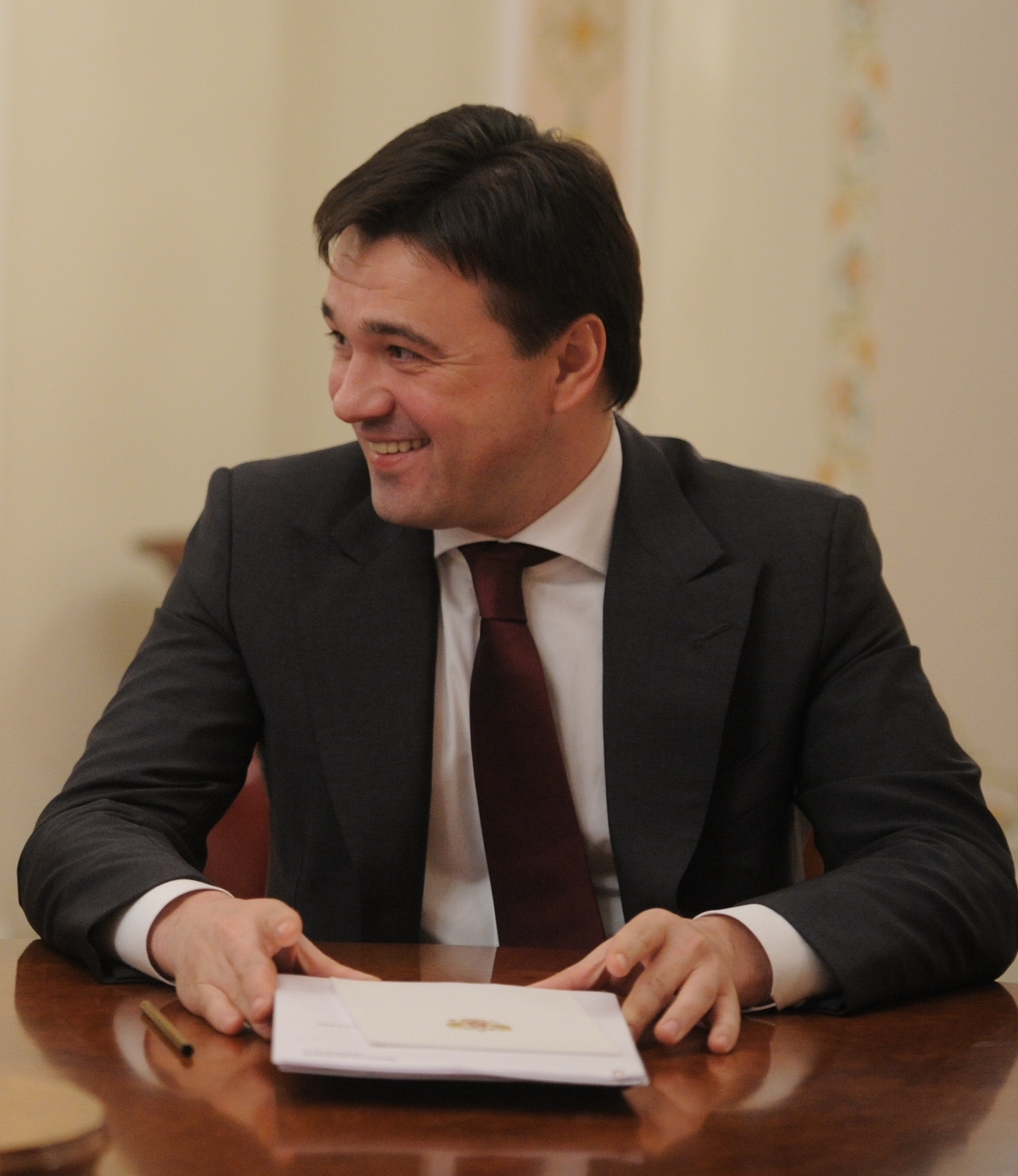 Андрей Воробьёв на встрече Председателя Правительства Российской Федерации В. В. Путина с руководством фракции «Единая Россия» в Государственной Думе